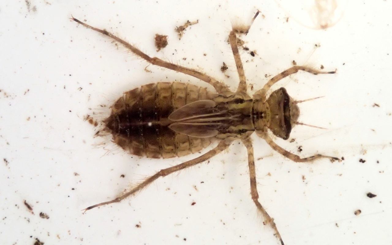 Libellula quadrimaculata, nymph, ninfa